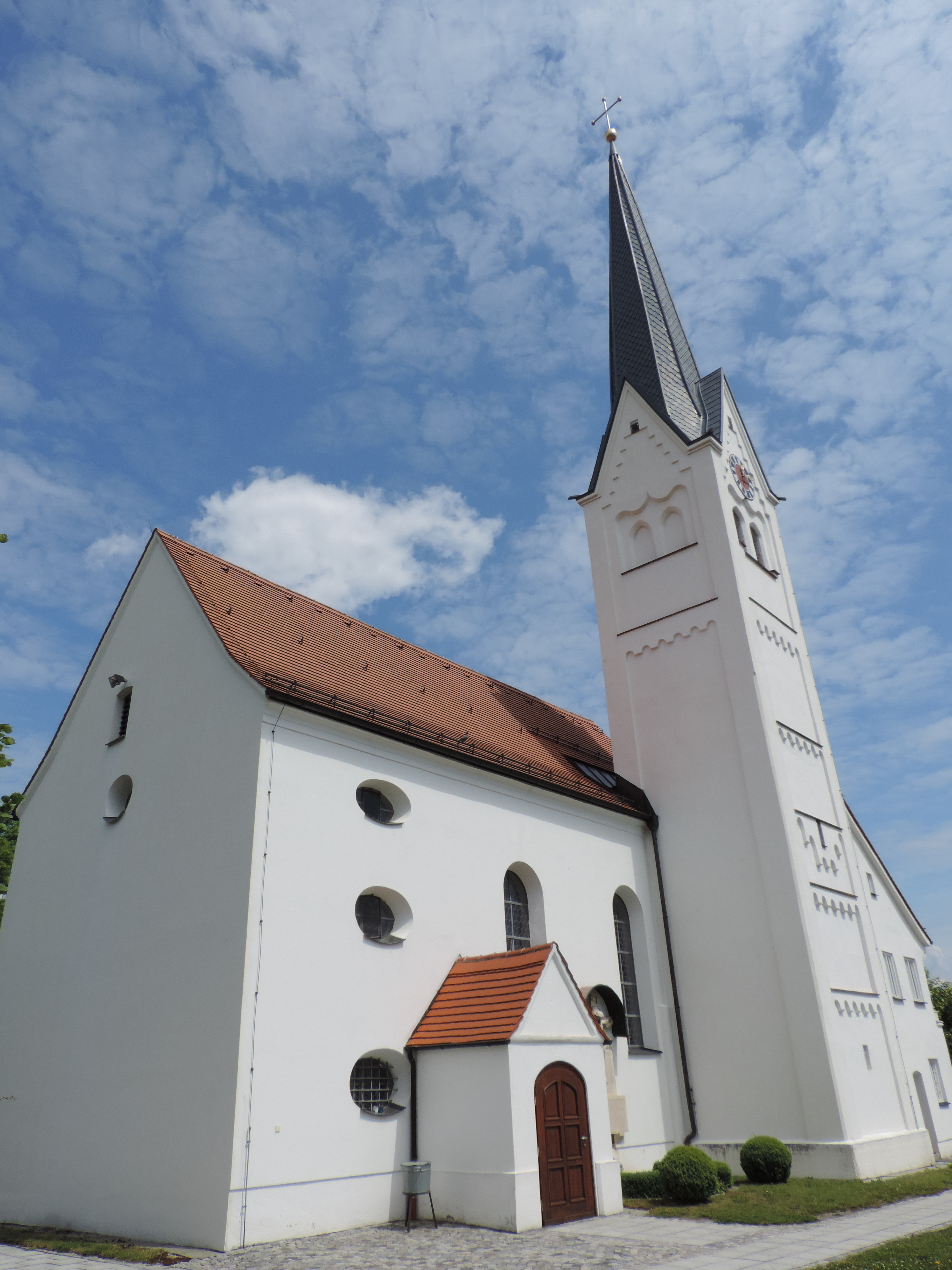 Südwestansicht